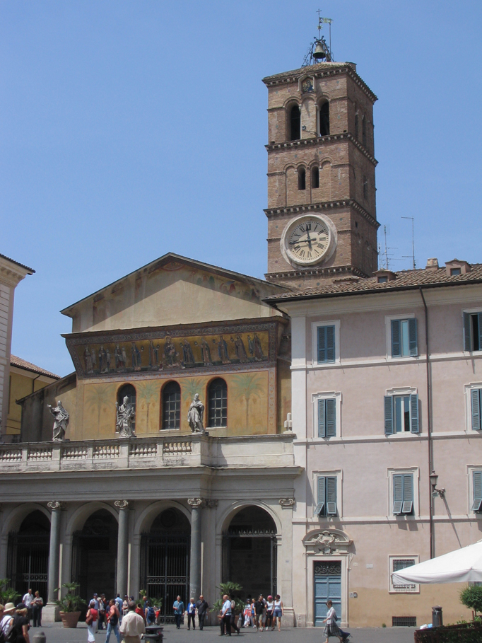 Roma, Italia